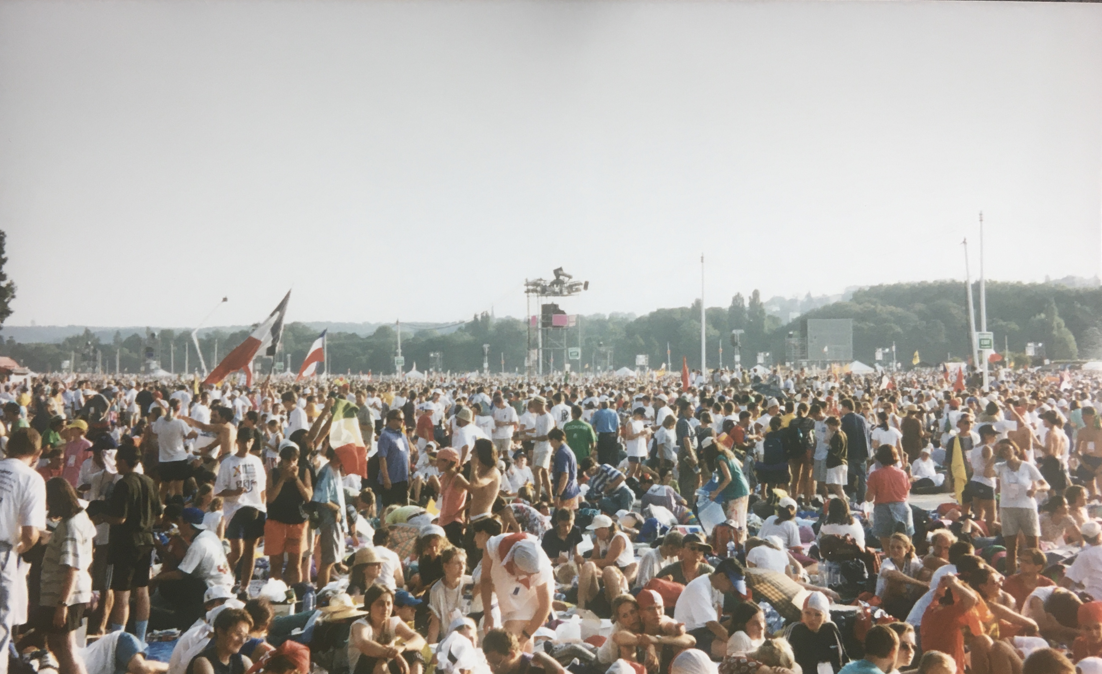 1997-08-23 Paris Longchamp JMJ.